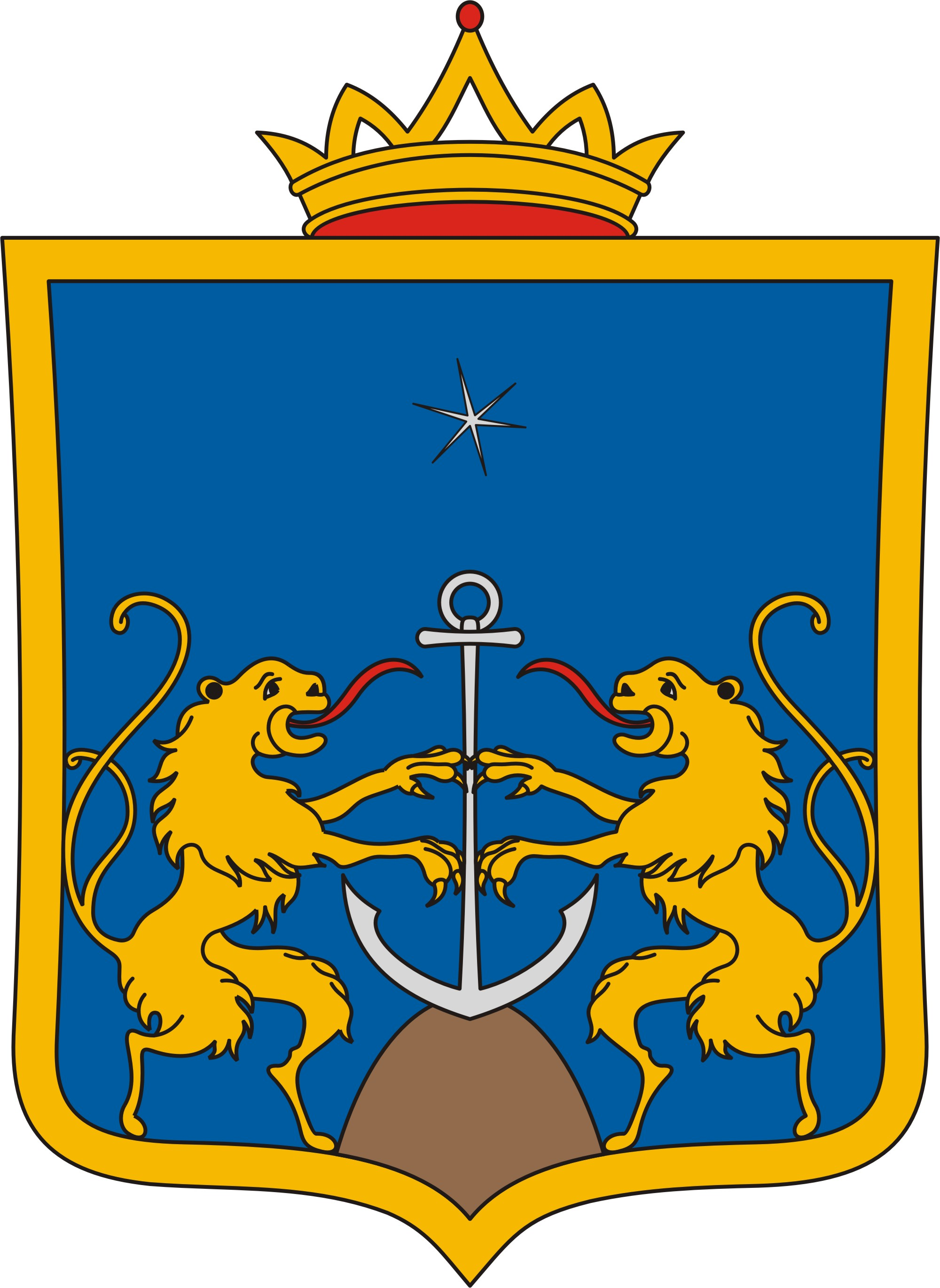 Coat of arms of Egyházaskozár, Hungary